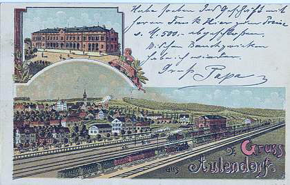 Bahnhof Aulendorf. Ansichtskarte.